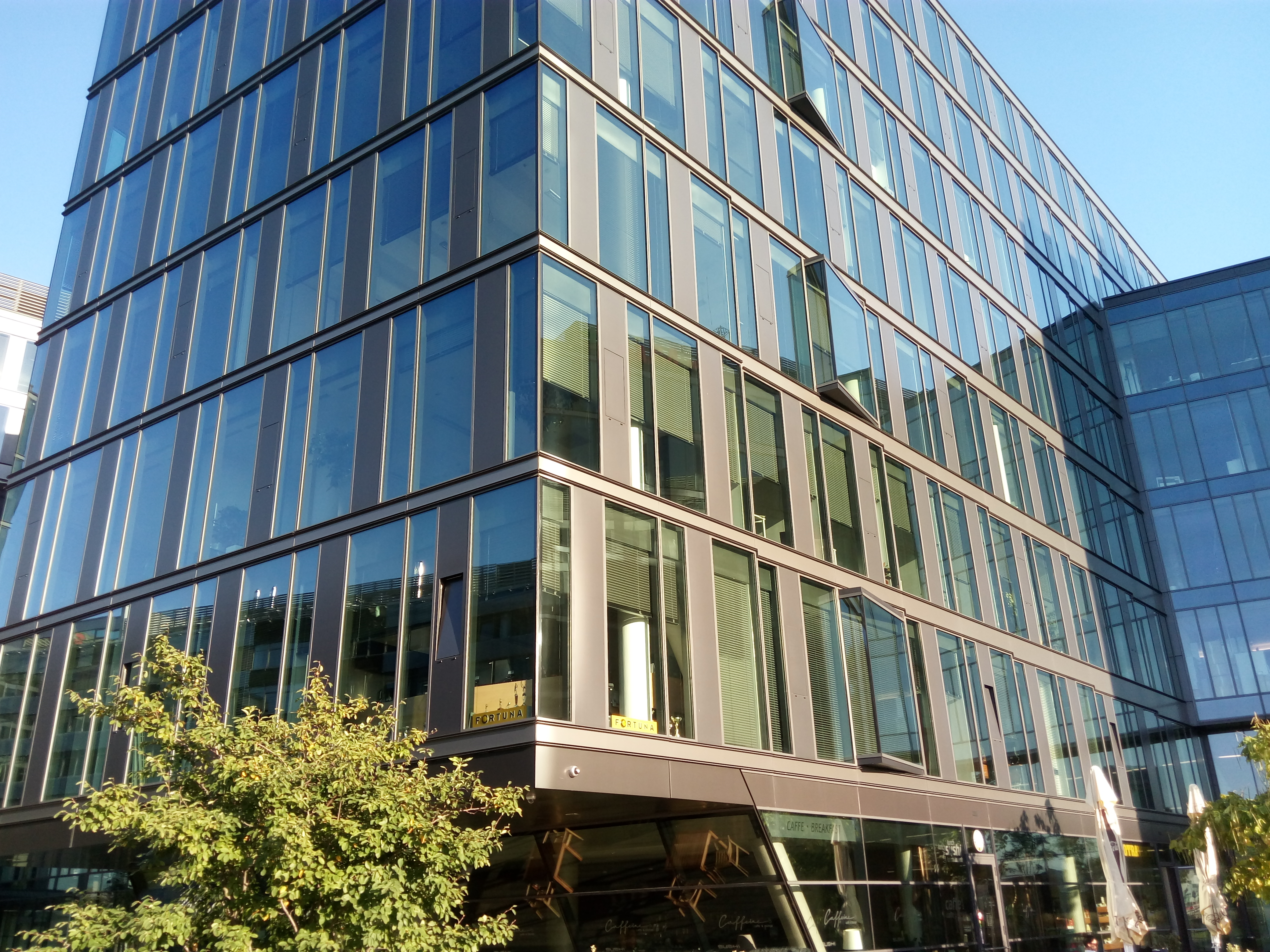 Digital Park, Einsteinova, Petržalka, Bratislava